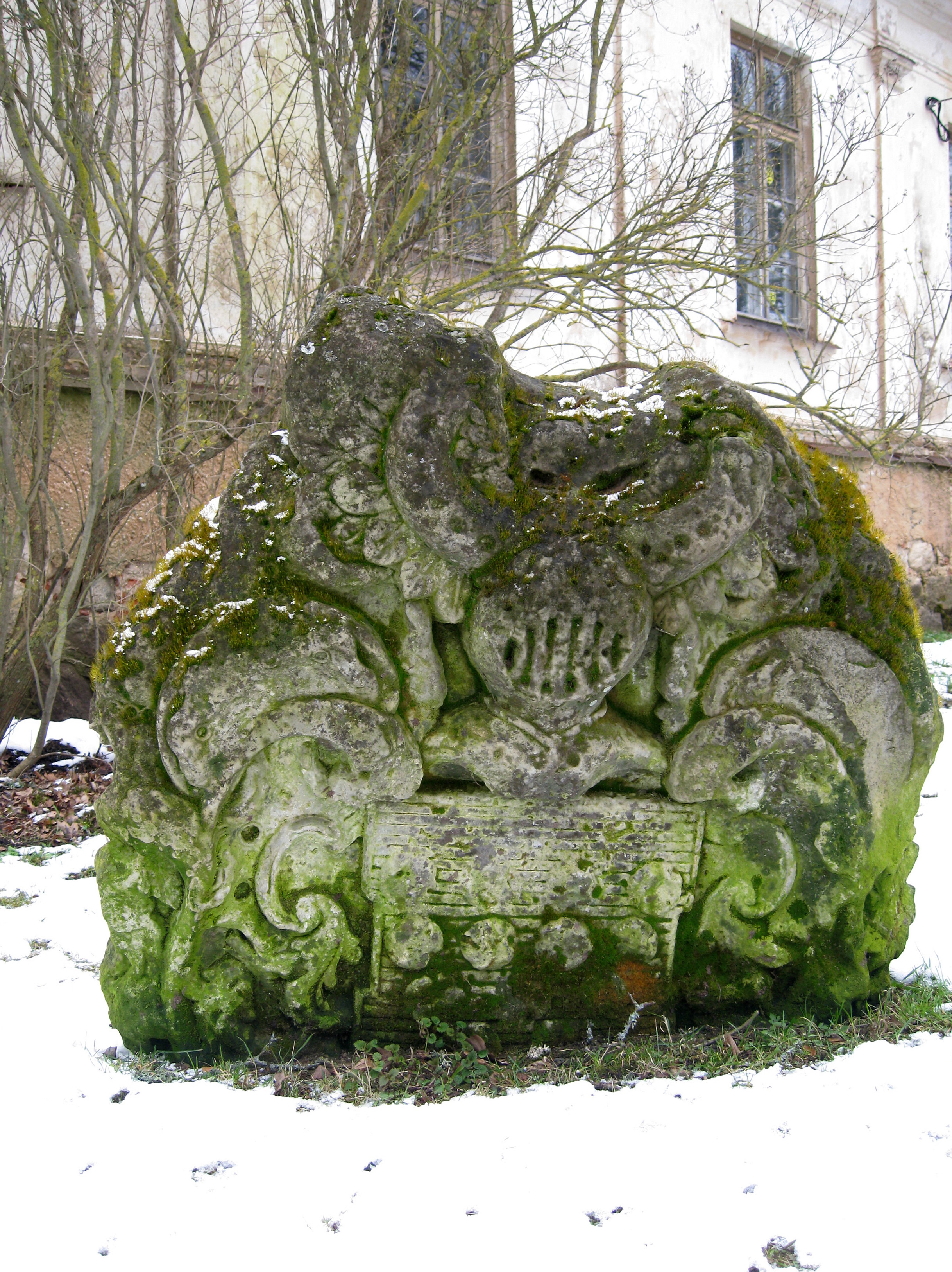 Stoun next to Kabile Manor